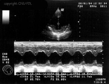 Sonographie; kombinierte B- und M-Mode Darstellung eines Hundeherzens